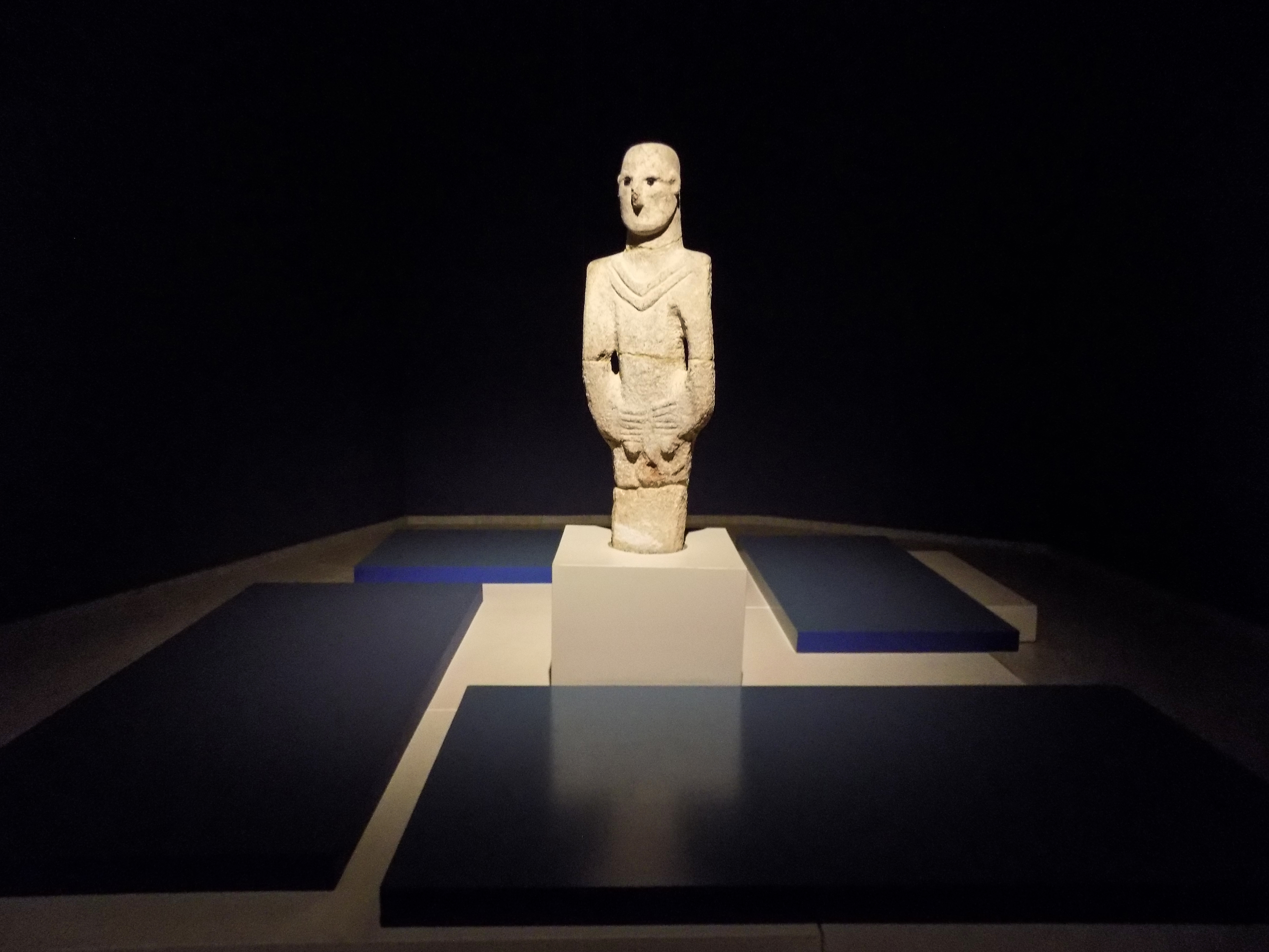 Urfa Adamı, insanlık tarihinin iyi korunagelmiş, doğal büyüklükteki en eski heykeldir. Balıklıgöl'ün hemen kuzeyinde, eski Urfa evlerinin altında bulunan bu heykel çanak çömleksiz Neolitik yerleşim bölgesinde 1990 yılında bulunmuştur. Yerleşim yerinin varlığı terazzo türü tabanlar ve o döneme ait çakmak taşı aletlerden anlaşılmaktadır. Kireçtaşından yapılmış olan heykel 1.80 metre boyunda olup derin betimlenen göz yuvalarına siyah obsidyen parçalar yerleştirilmiştir. "V" biçimli kolyeyi andıran çizgiler dışında heykel çıplak görünümdedir ve elleri önde kavuşturulmuştur. Heykelin alt kısmı bir yuvaya yerleştirilecek şekilde "U" biçimli oyulmuştur.